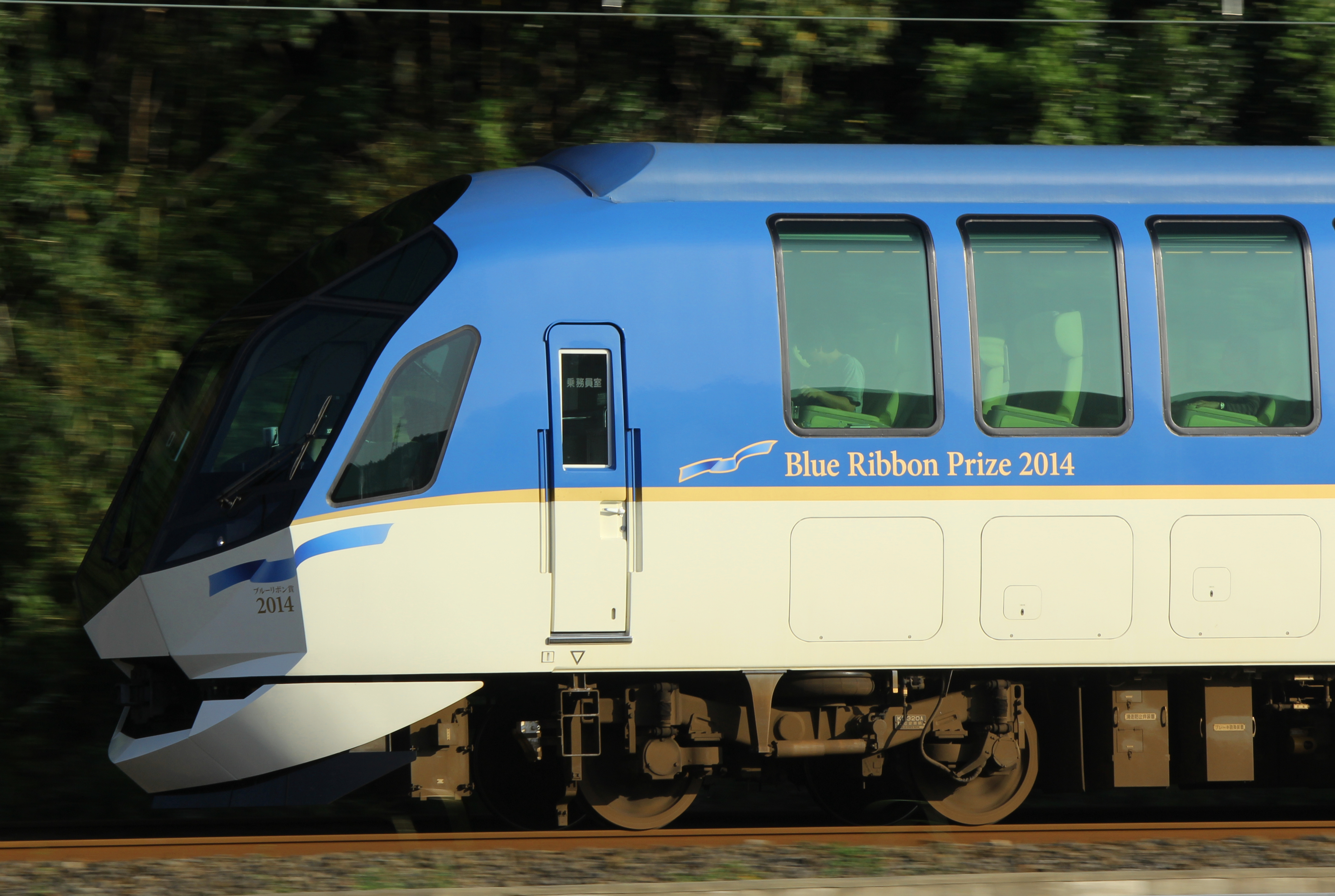 近鉄50000系ブルーリボン賞受賞記念ラッピング（ＳＶ02編成）